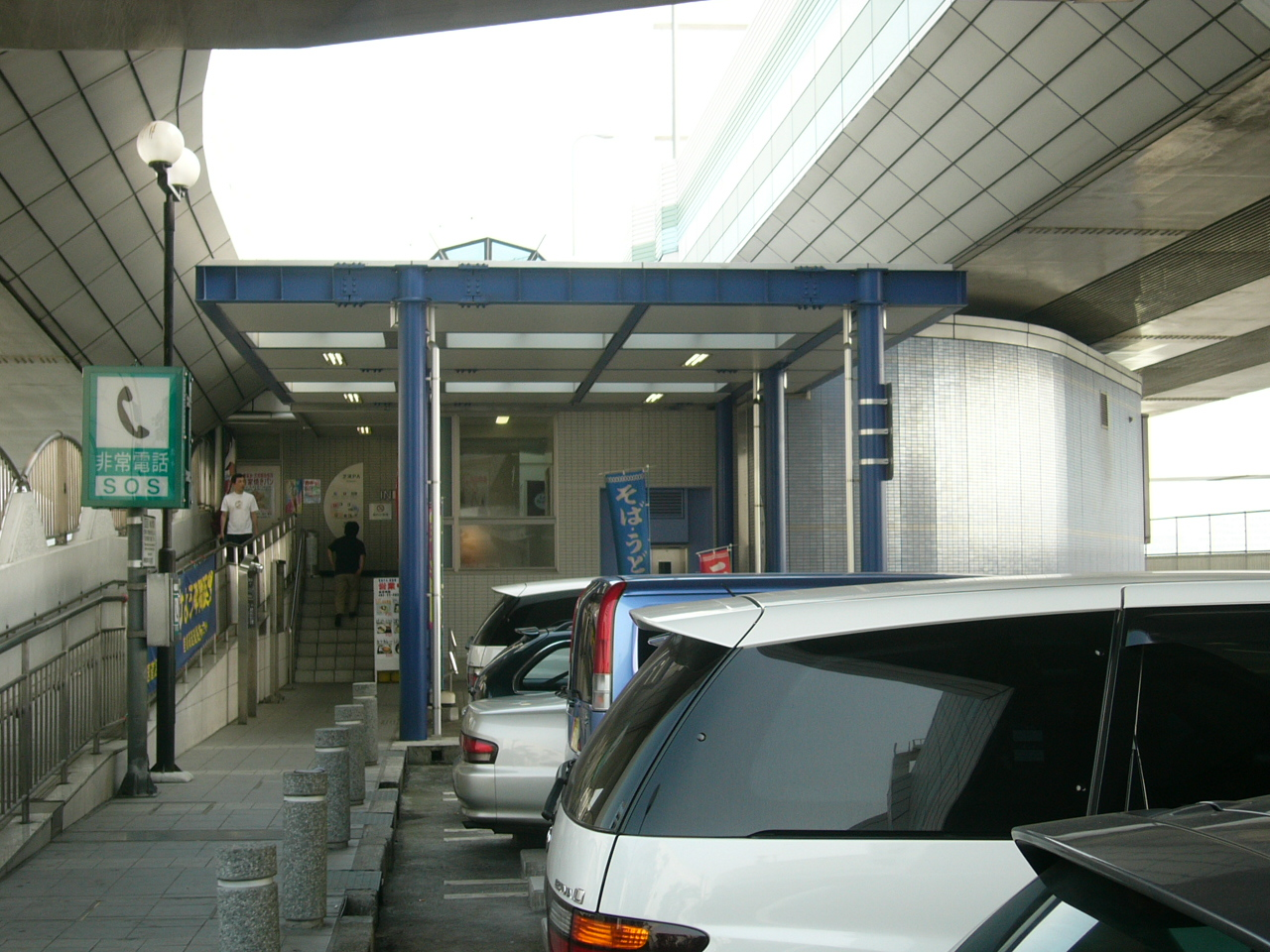 Shibaura Parking Area